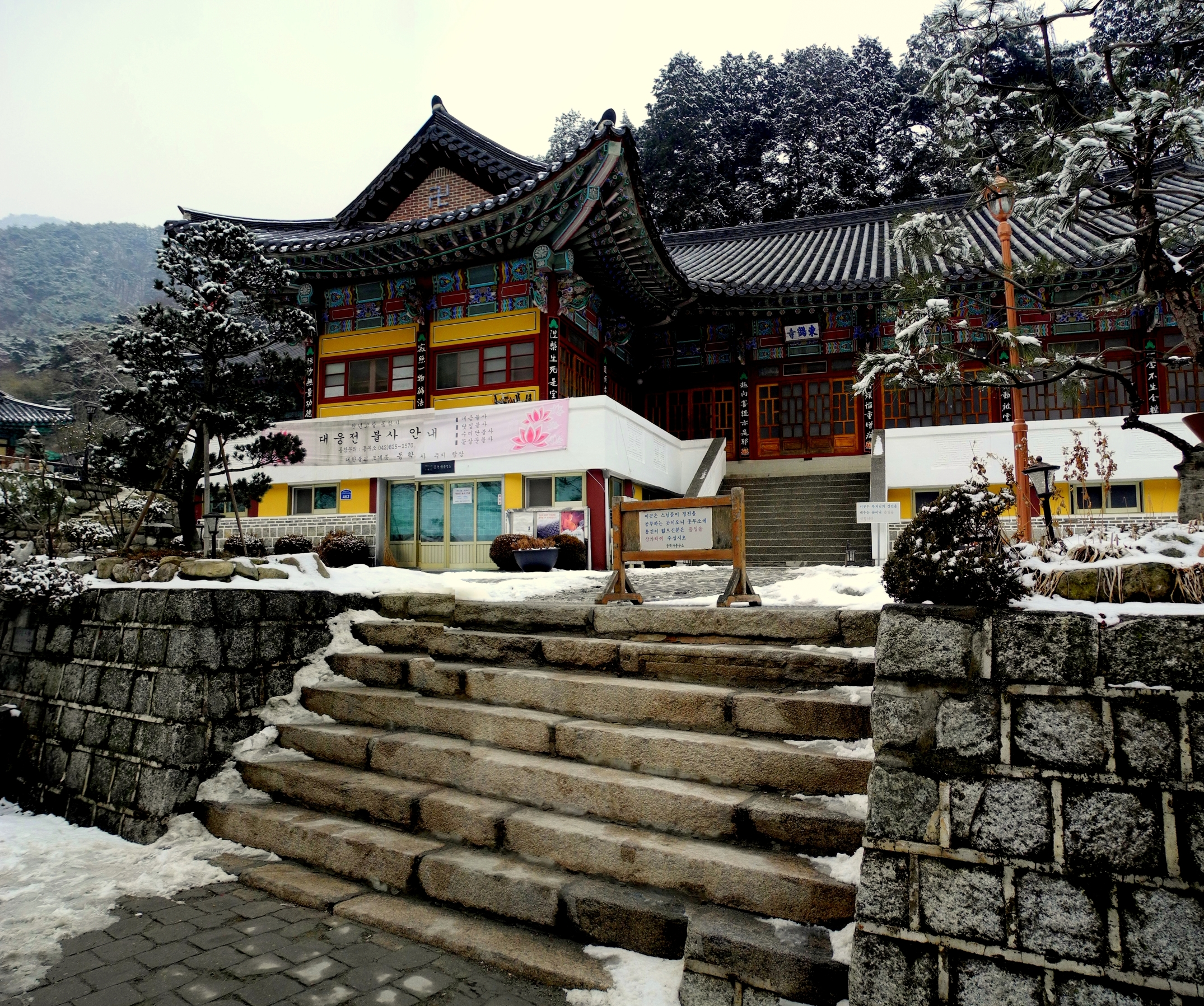 Dong Hak Temple Outside